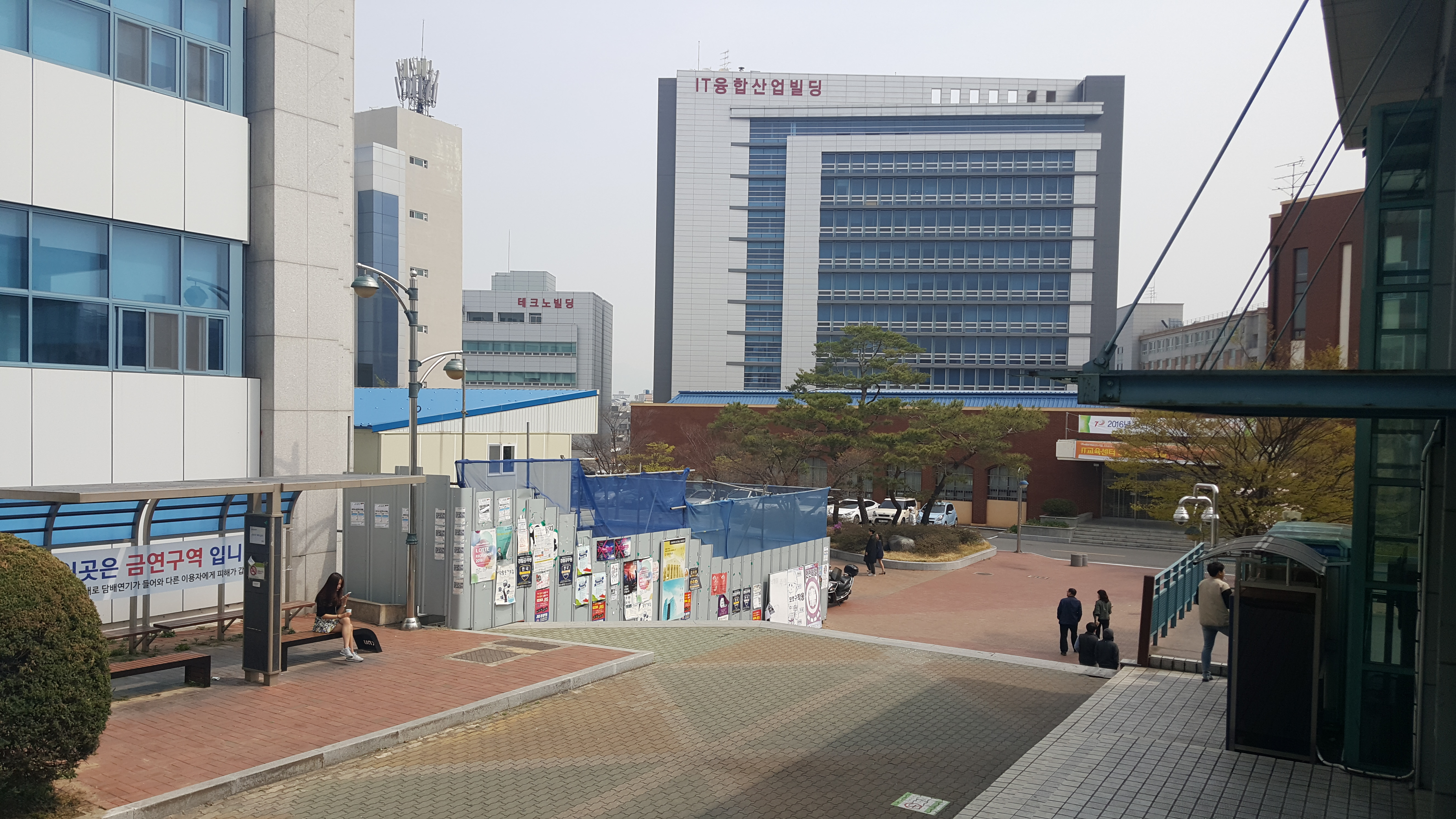 중앙도서관에서 바라본 경북대학교 테크노파크. 중앙에 보이는 건물은 IT융합산업빌딩이다.